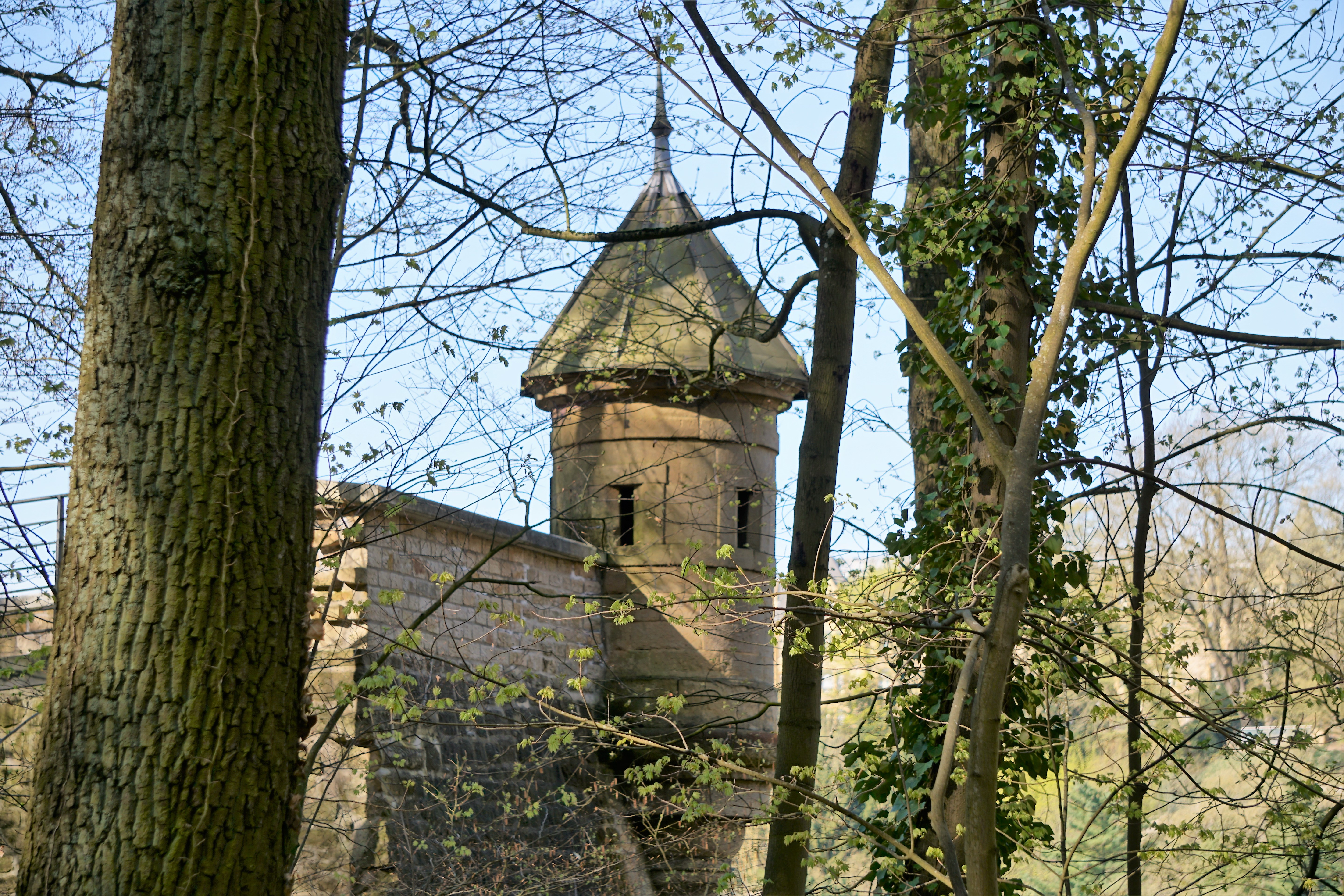 Spueneschen Tiermchen 01 - Virsprong vun der lénkser Hallefbastioun vum Fort Niedergrünewald (Krounwierk).